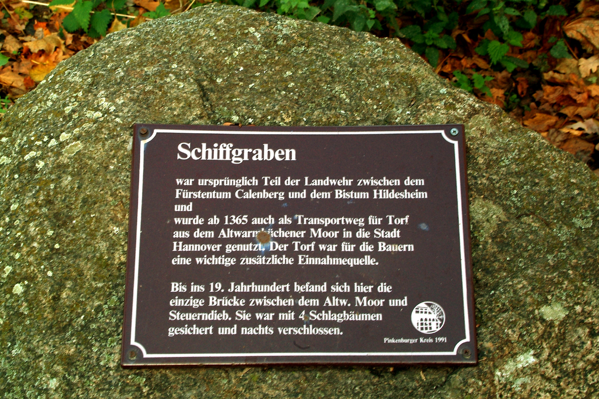 Infotafel vom Pinkenburger Kreis am Schiffgraben in der Pinkenburger Straße